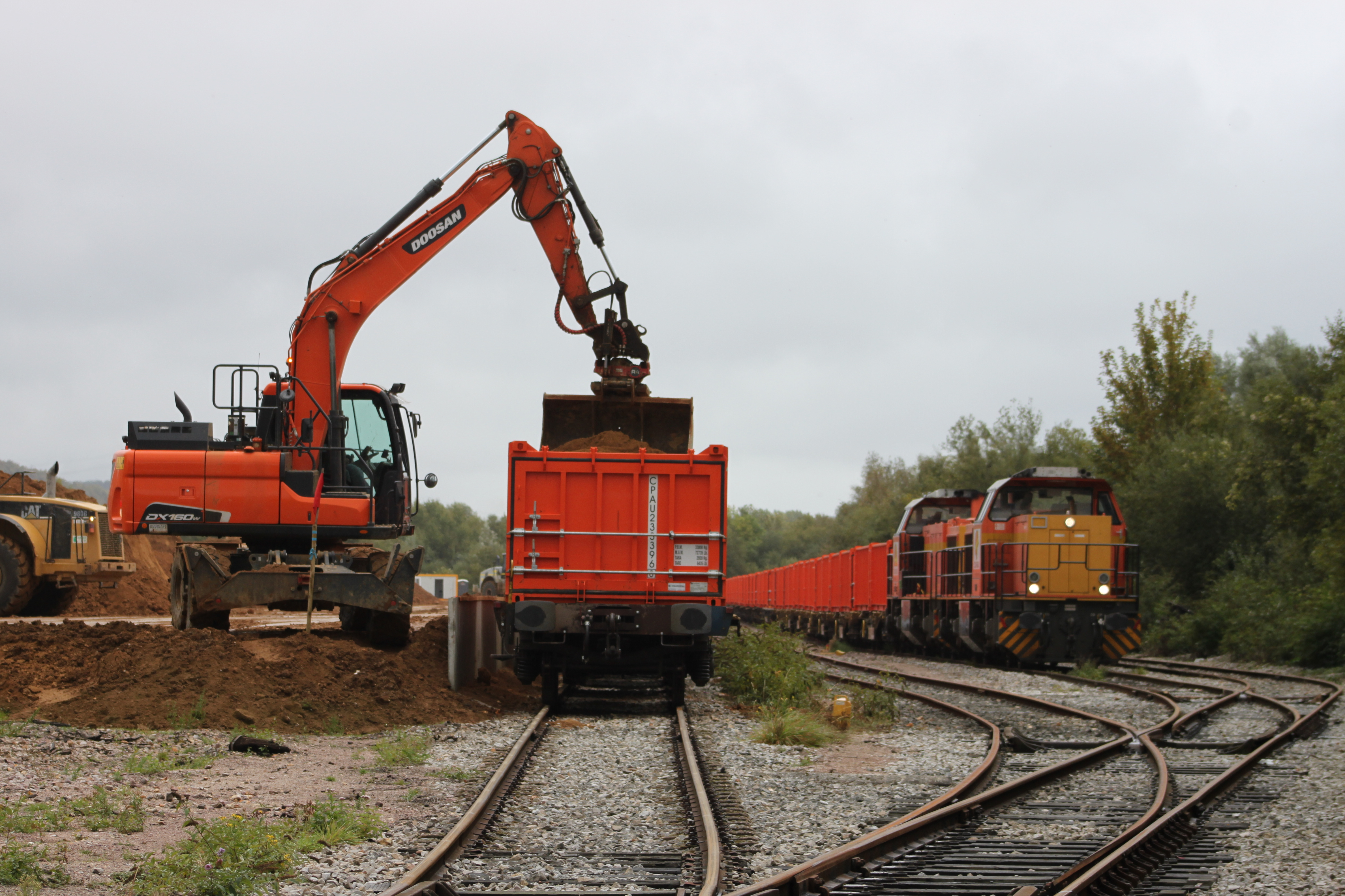 Rouxmesnil-Bouteilles(76), ancien site ferroviaire aménagé en juin-juillet 2018 pour y charger de la terre issue du chantier d'une section de la R.N.27(près de Tourville-sur-Arques) . Voie 4 chargement d'une rame de wagons portes bennes . Voie 2 un train chargé rebroussera pour tirer ensuite vers Dieppe (puis Rouen) .